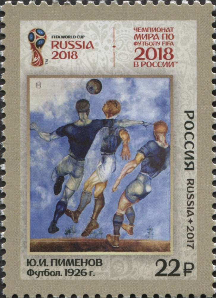 Почтовая марка России, выпущенная 20 декабря 2017 года, из серии «Чемпионат мира по футболу FIFA 2018 в России™. Футбол в искусстве». На марке помещена репродукция картины Ю. И. Пименова «Футбол» (1926 год). Дизайнер — О. Шушлебина. Номер по каталогу — 2306.